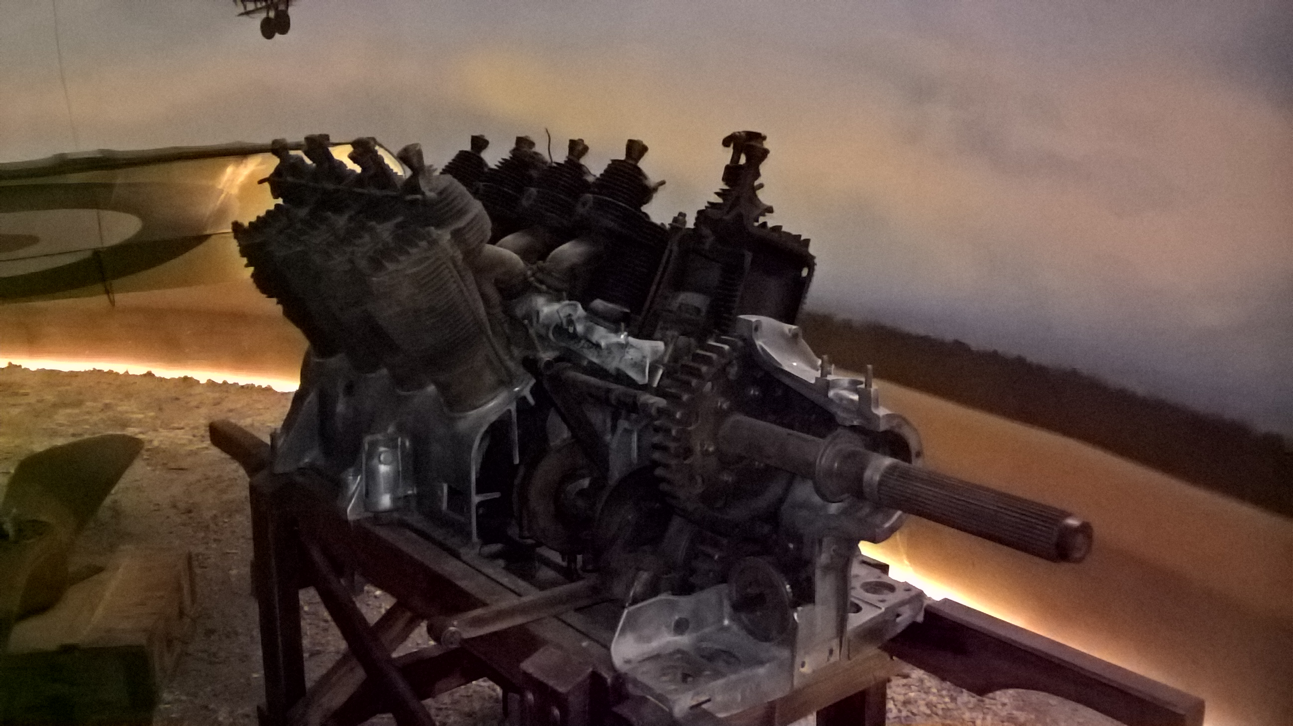 Brytyjski 12-cylindrowy silnik widlasty RAF 4 (przekrój) z okresu I wojny światowej ze zbiorów Muzeum Lotnictwa Polskiego w Krakowie.